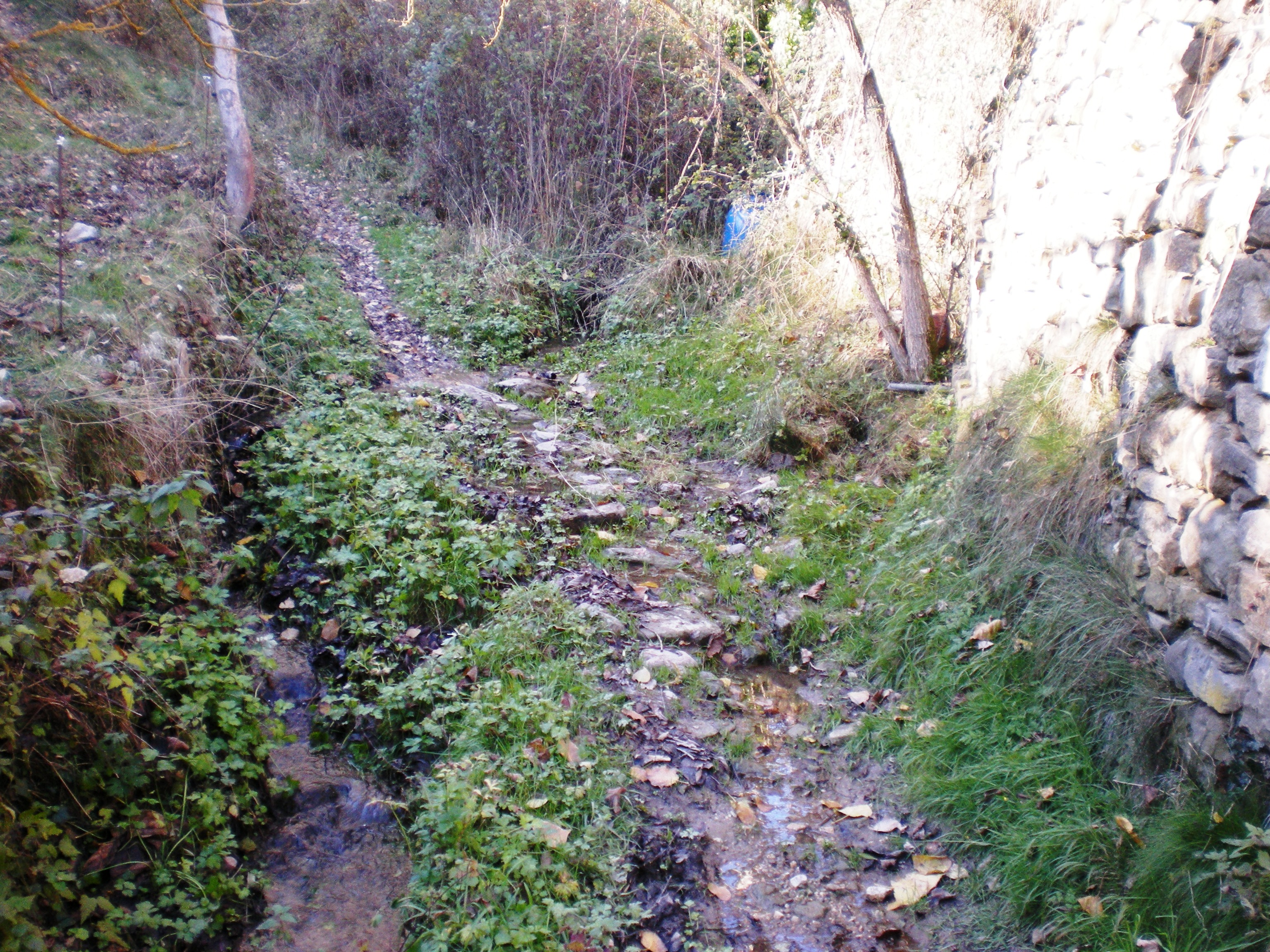 El torrent del Pou al seu pas per davant la font que porta el nom d'aquest torrent.